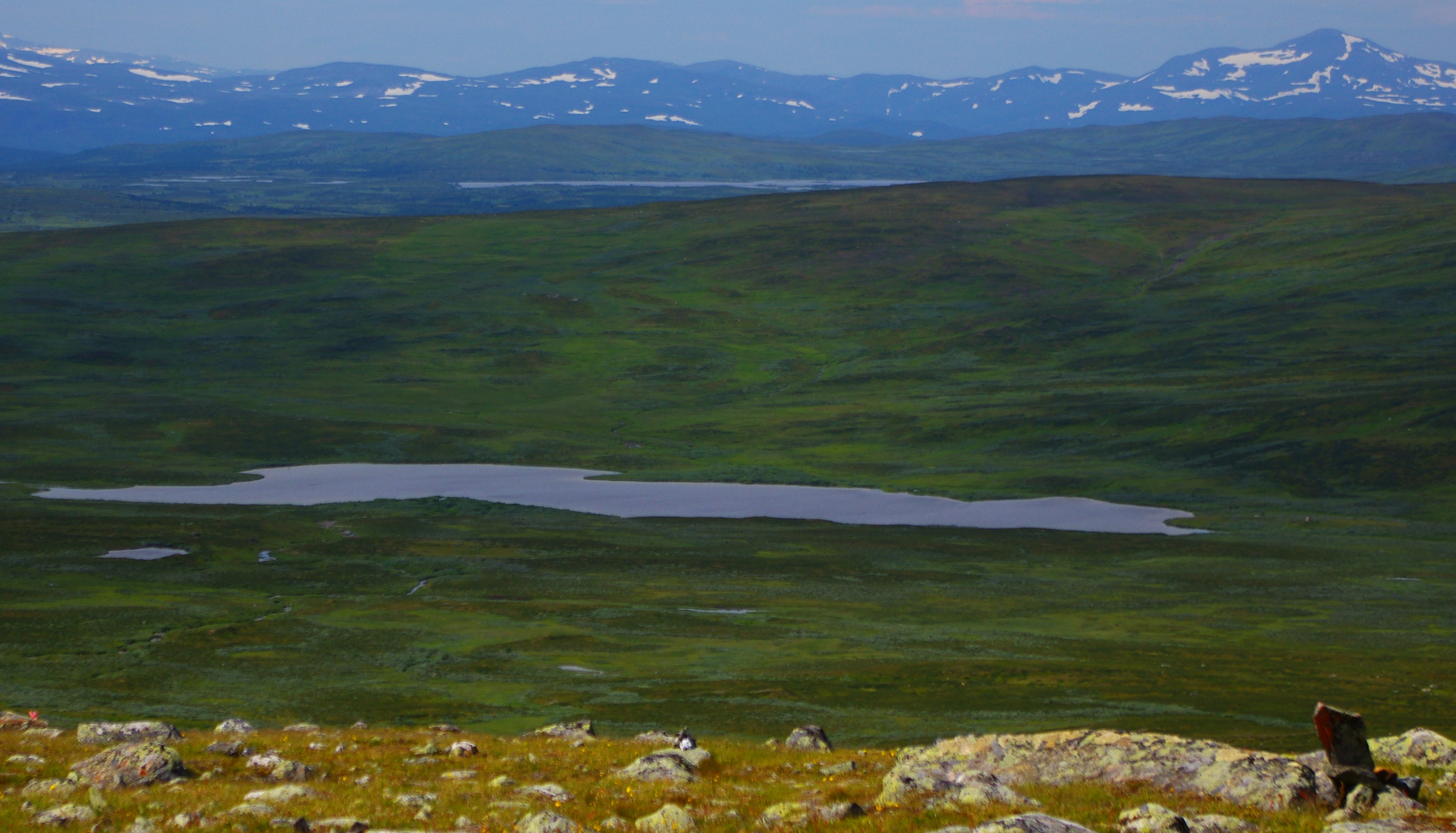 Vuomejaure eller Vuomajávrrie är en sjö i Sorsele kommun i Lappland i Sverige.